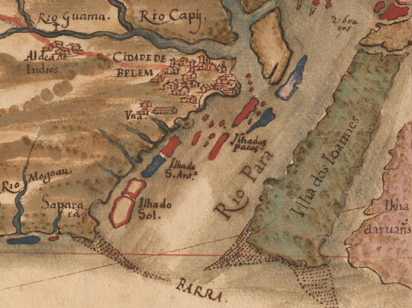 Imagem parcial do "Pequeno atlas do Maranhão e Grão-Pará" mostrando apenas a Cidade de Belém e arredores.